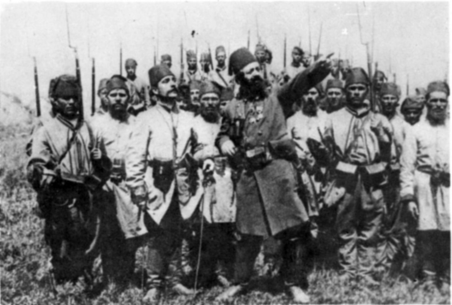 Frame from Independenţa României film (1912). The turks. Constantin Nottara as Osman Paşa.